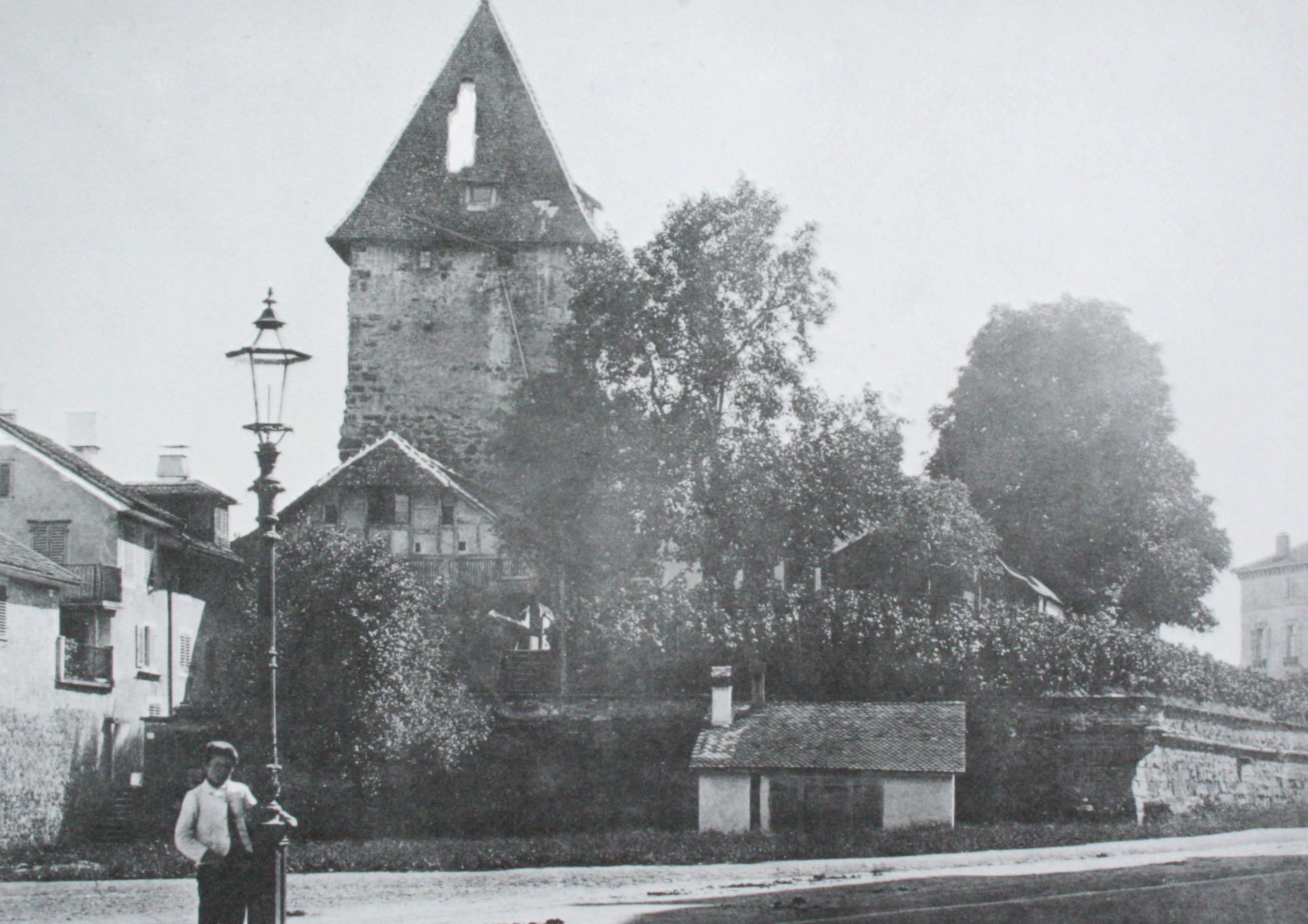 Kratzturm und Baugarten, um 1876. Das Haus rechts gehört zum Baur au Lac